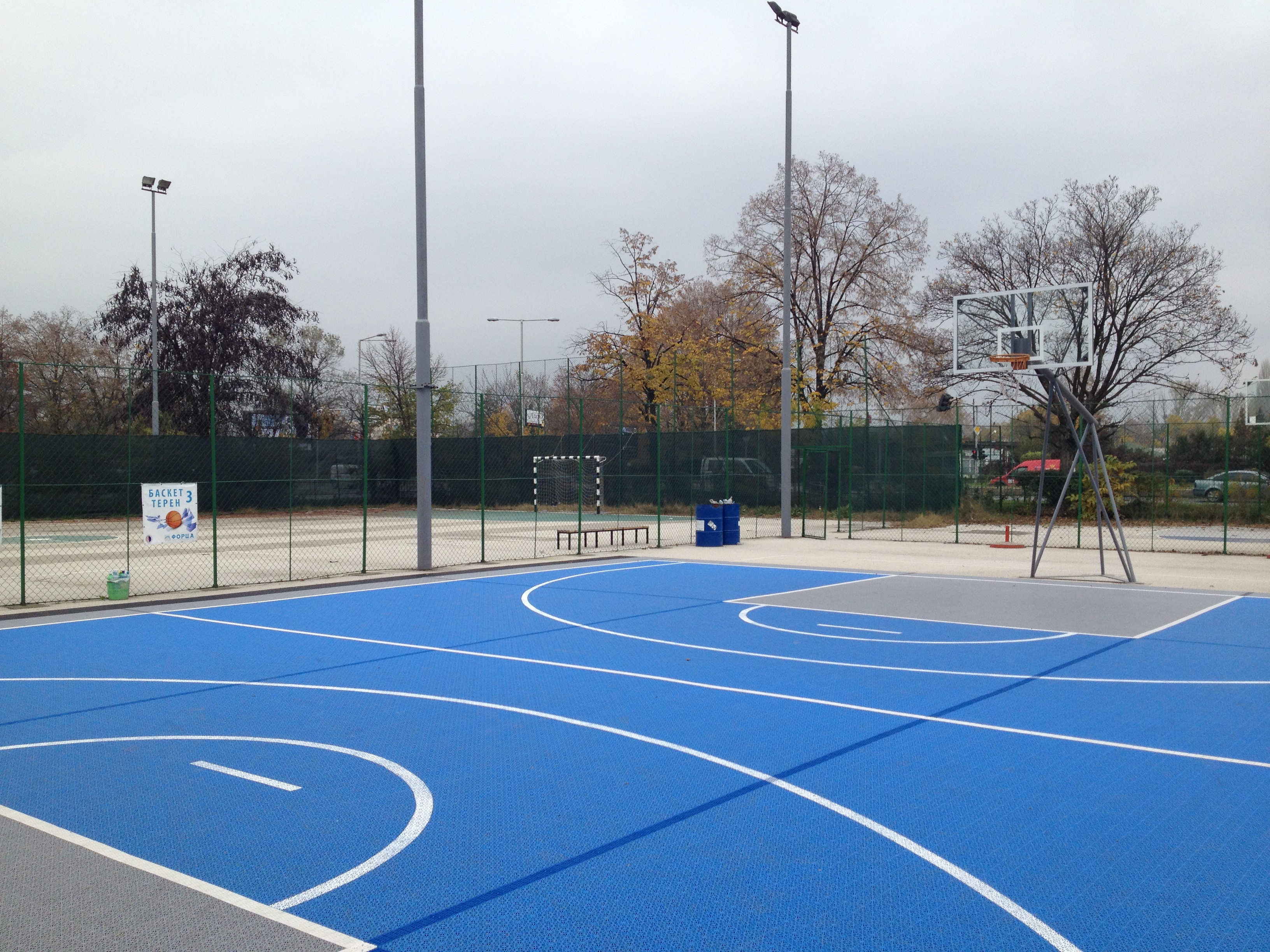 Кошаркарските терени на Орце Николов како дел од спортската сала.